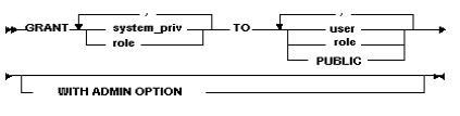 Синтаксис команды GRANT